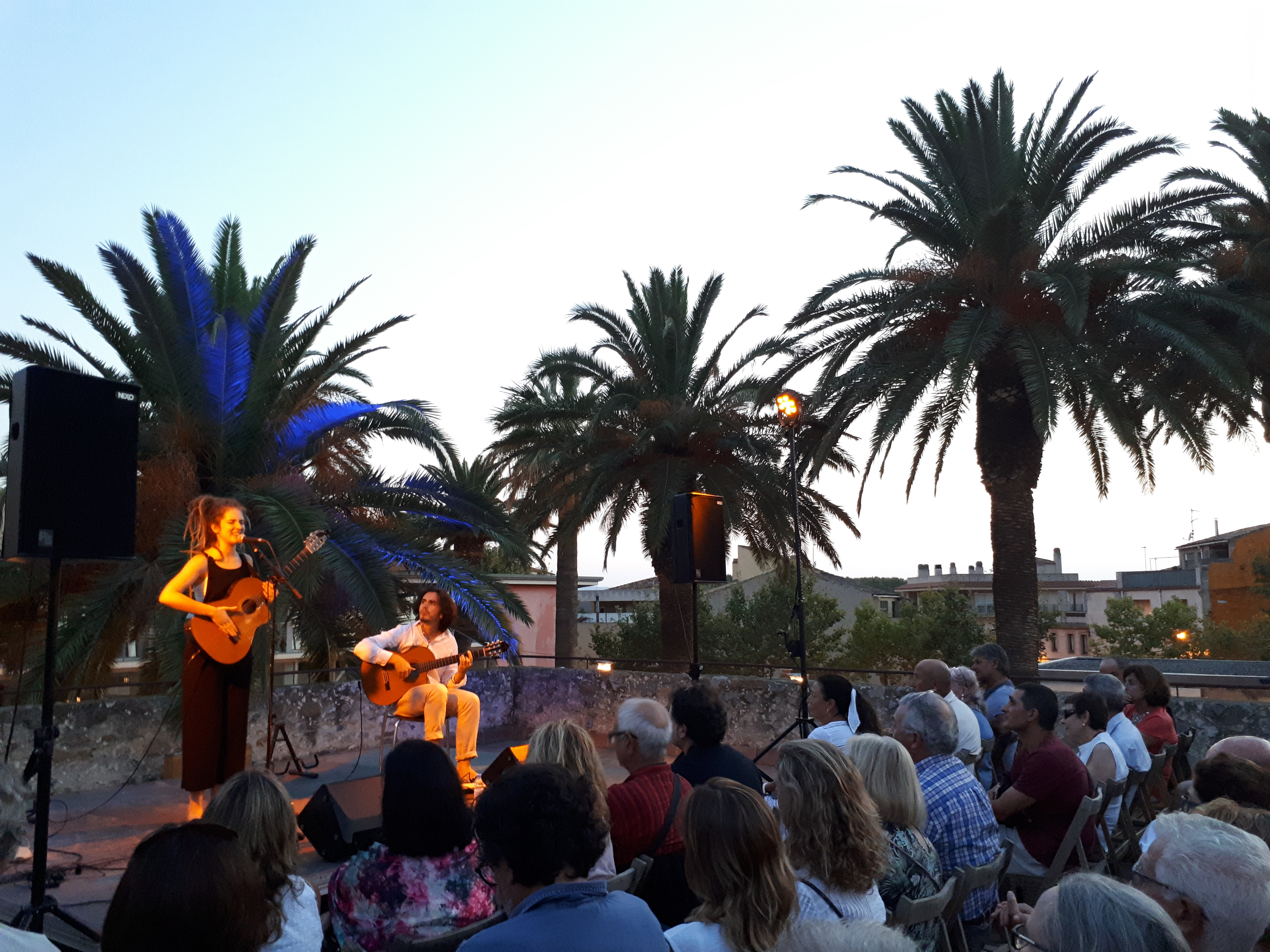 Concert d'Alidé Sans, en els Capvespres musicals del 2017